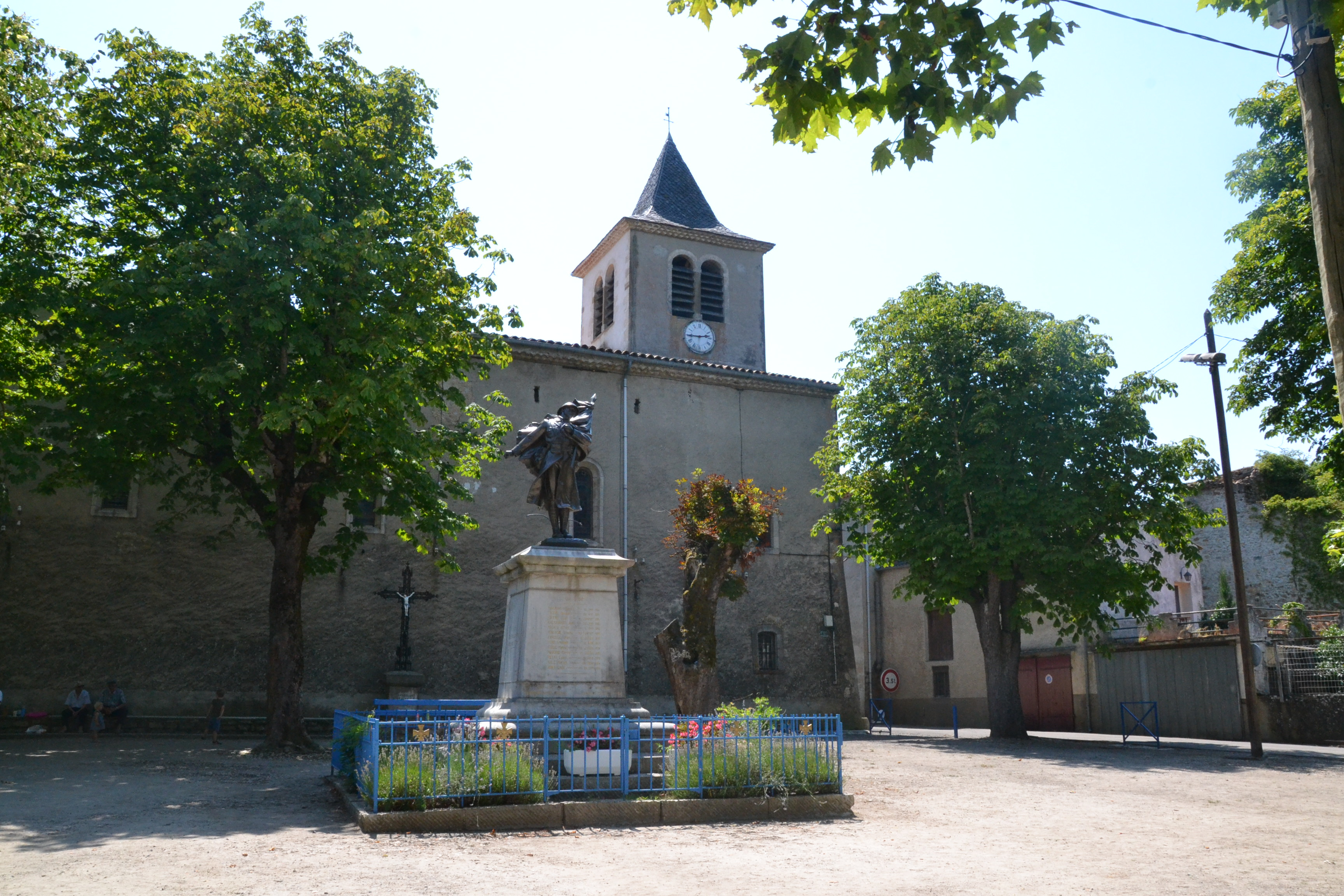 L'église et la place centrale de Nébias (Aude, France).